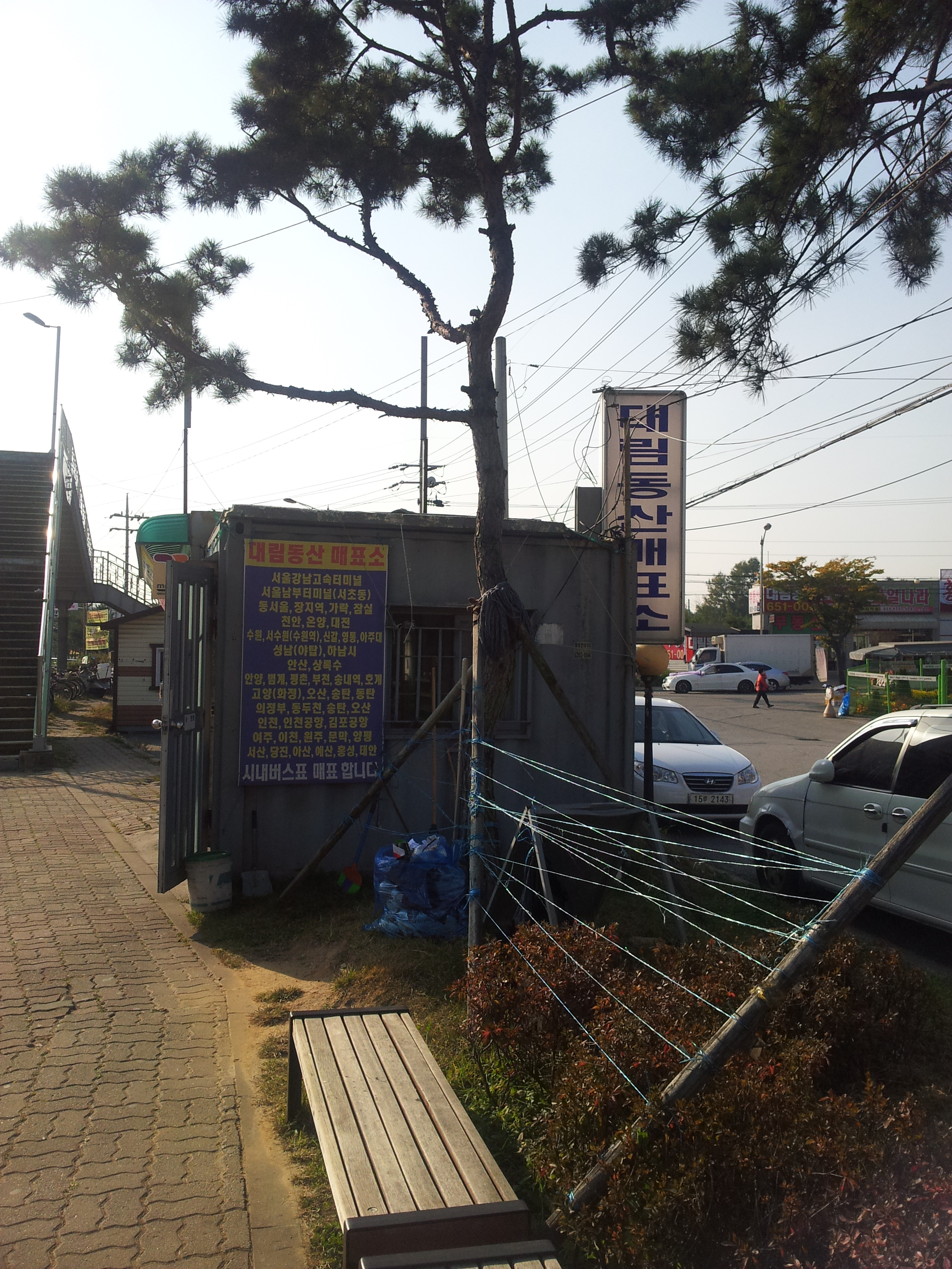 대림동산시외버스정류장 (측면)